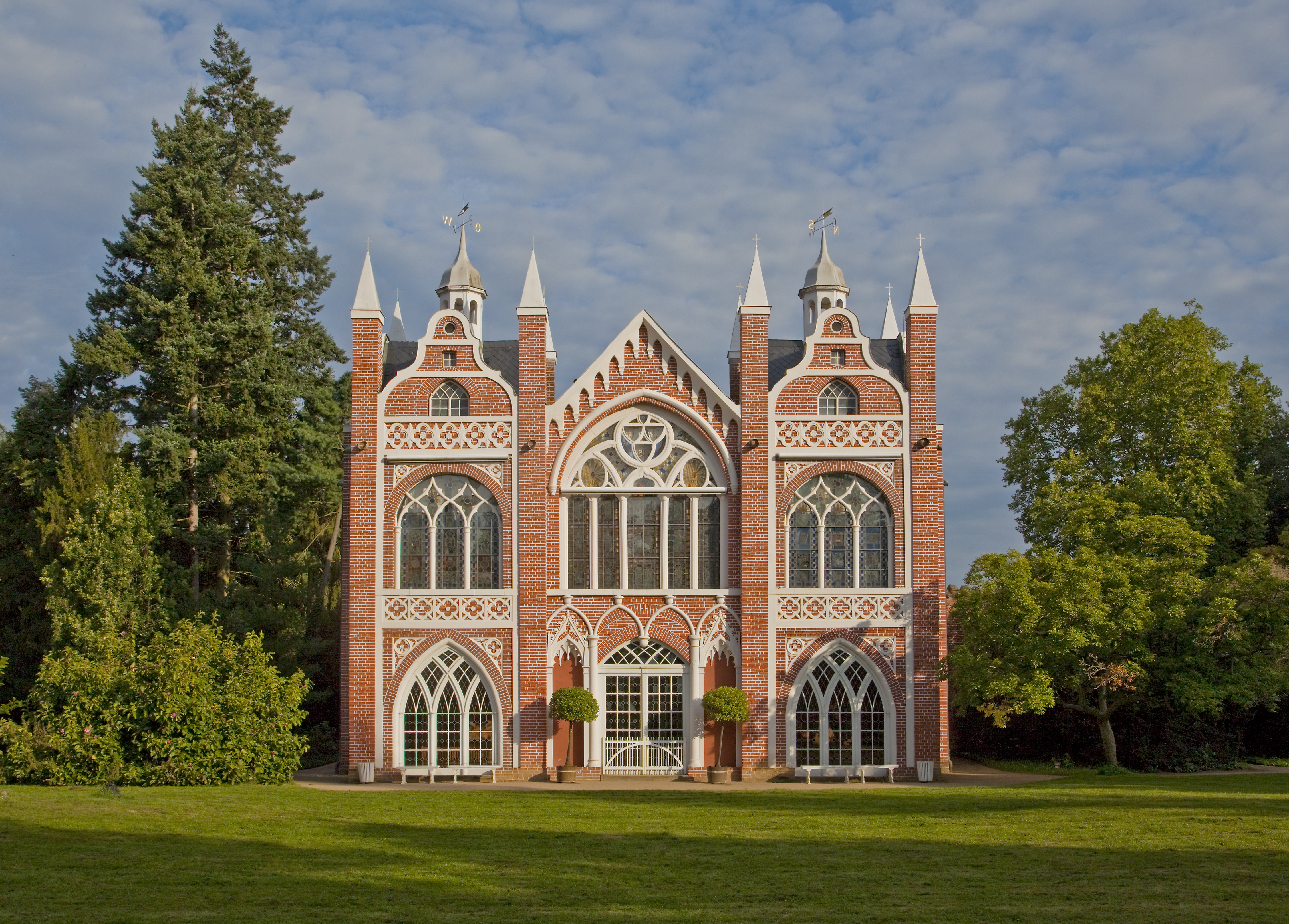 Das Gotische Haus in den Wörlitzer Anlagen